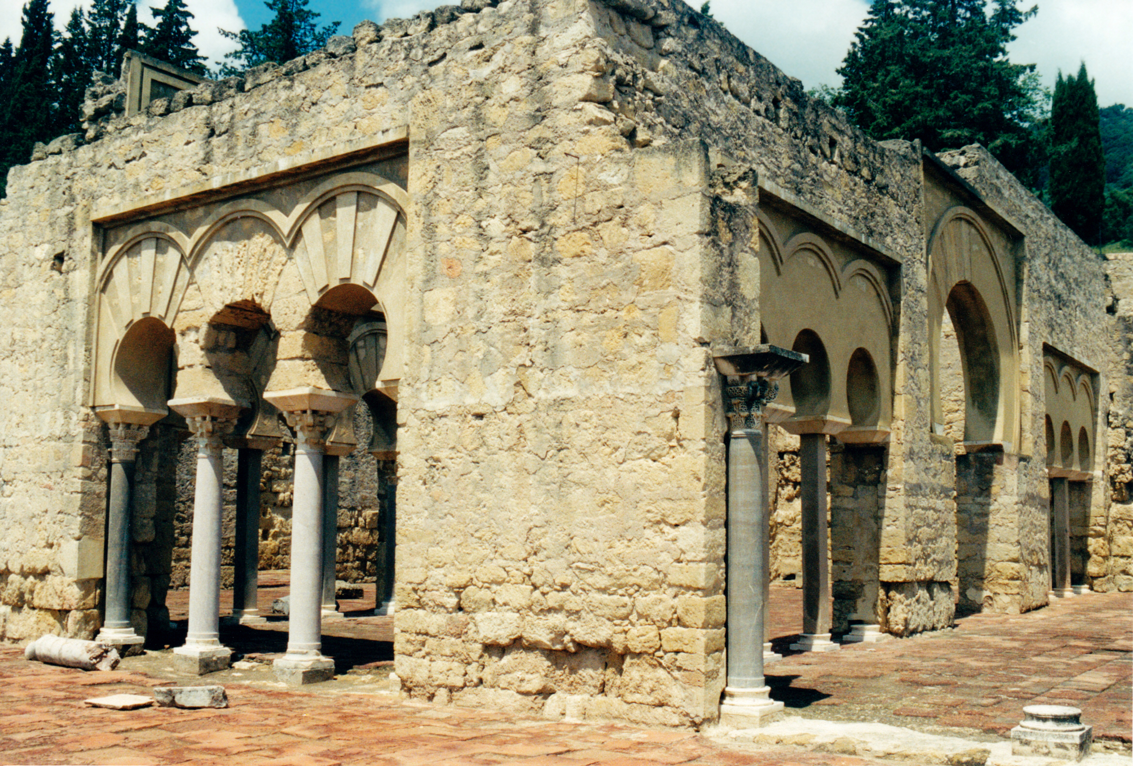 Espagne - Andalousie - Medina Al-Zahra - Dar al-Wuzara